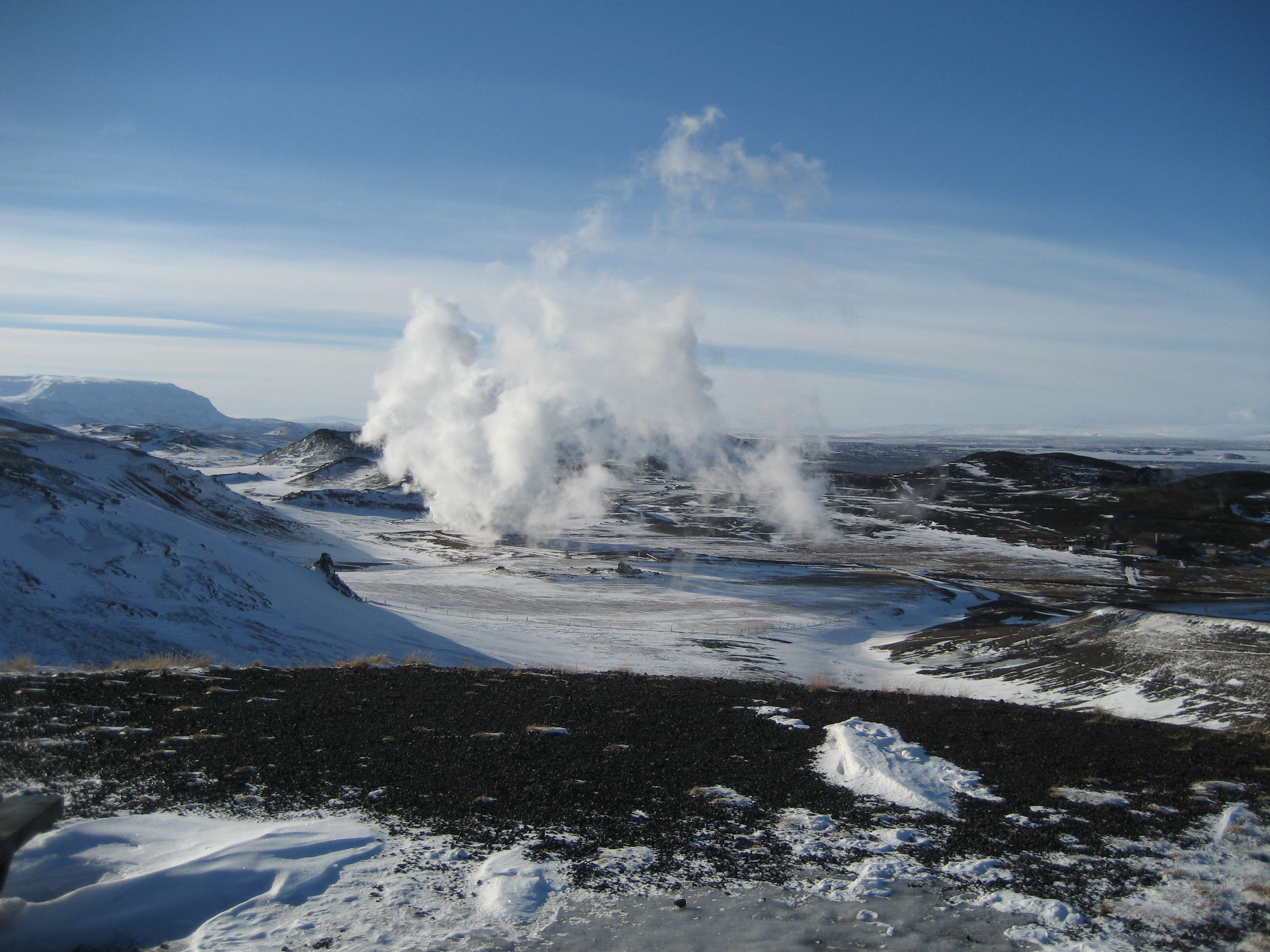 Mývatn, Islandia 2007